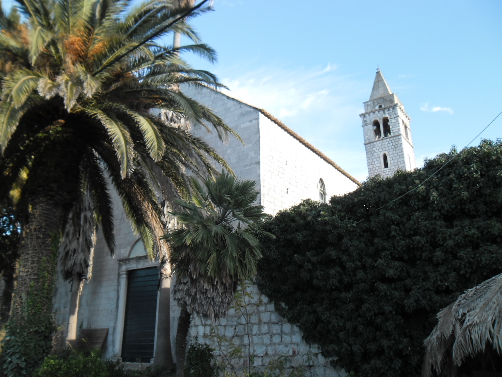 crkva na Lopudu